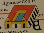 pictogrammes inclus dans les tables de Peutinger.